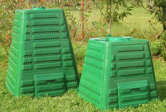 Termokompostowniki